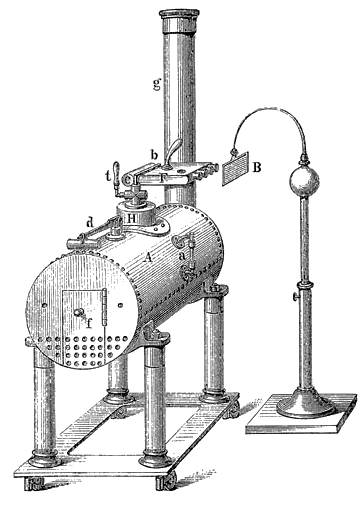 Armstrongs Dampf-Elektrisiermaschine